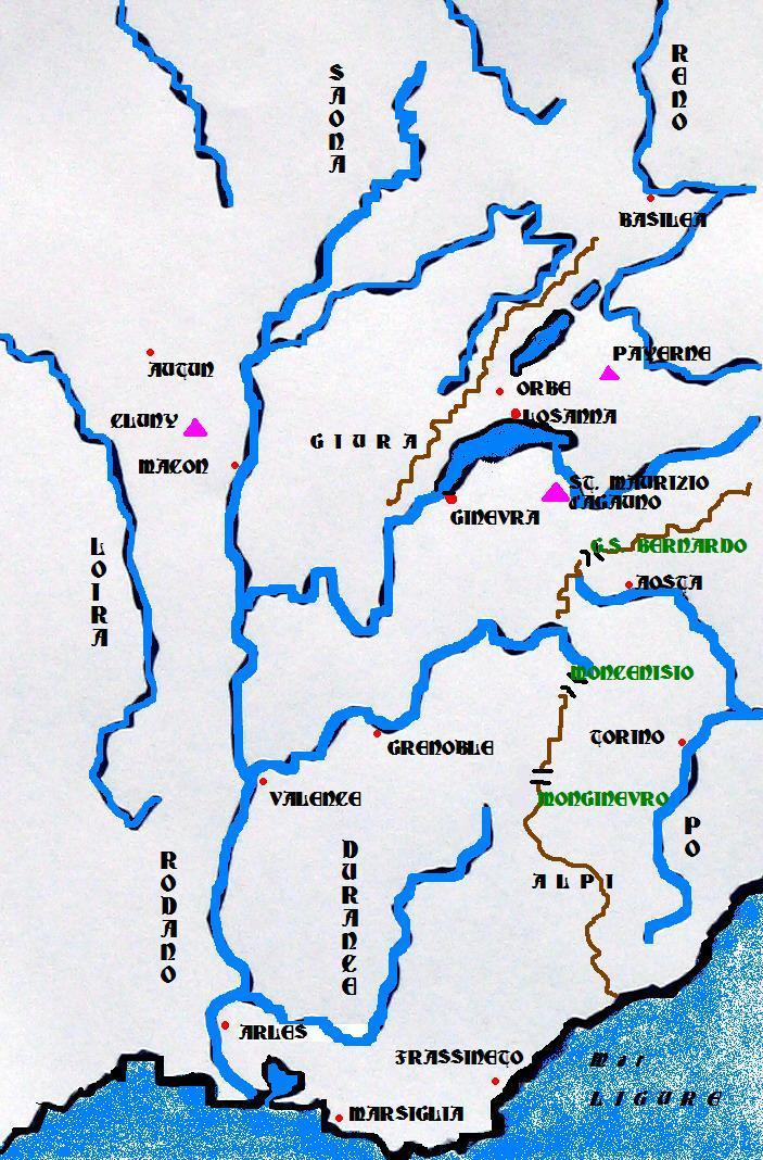 La Borgogna nel IX, X secolo.